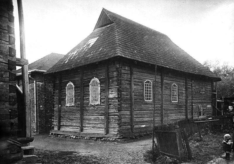 Wooden synagogue in Felsztyn (Skelivka).